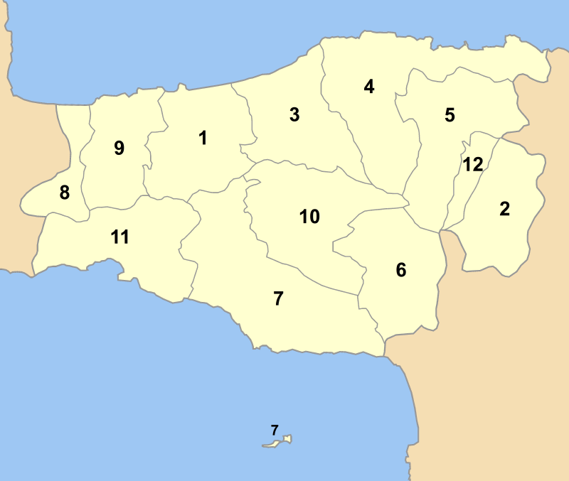 Map of Rethyymnon prefecture (Greece) with administrative divisions (municipalities) numbered in alphabetical order (in greek). Legend: 1 -- Δήμος Ρεθύμνου -- Rethymno 2 -- Δήμος Ανωγείων -- Anogia 3 -- Δήμος Αρκαδίου -- Arkadi 4 -- Δήμος Γεροποτάμου -- Geropotamos 5 -- Δήμος Κουλούκωνα -- Kouloukonas 6 -- Δήμος Κουρήτων -- Kourites 7 -- Δήμος Λάμπης -- Lambi 8 -- Δήμος Λαππαίων -- Lappa 9 -- Δήμος Νικηφόρου Φωκά -- Nikiforos Fokas 10 -- Δήμος Σιβρίτου -- Sivritos 11 -- Δήμος Φοίνικα -- Finikas 12 -- Κοινότητα Ζωνιανών -- Zoniana